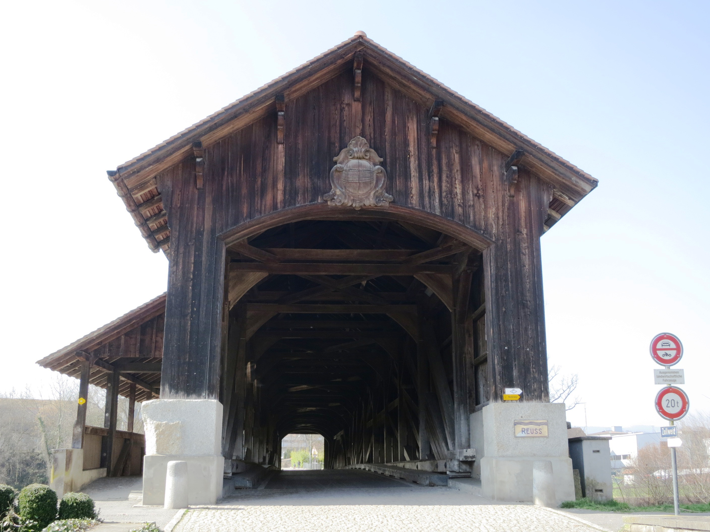 Reussbrücke Hünenberg ZG, Schweiz